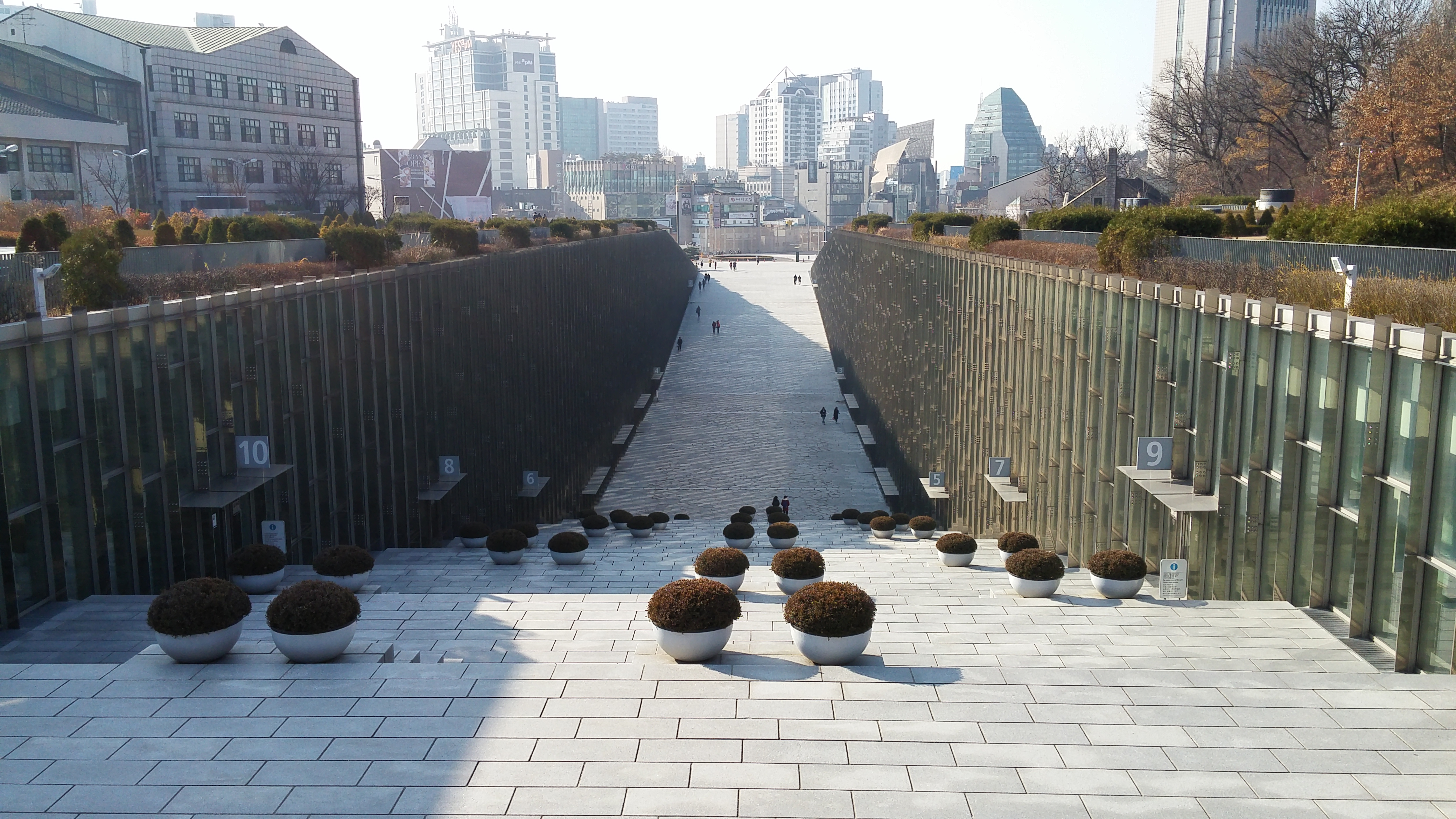 Campus der Ewha Woman's University.